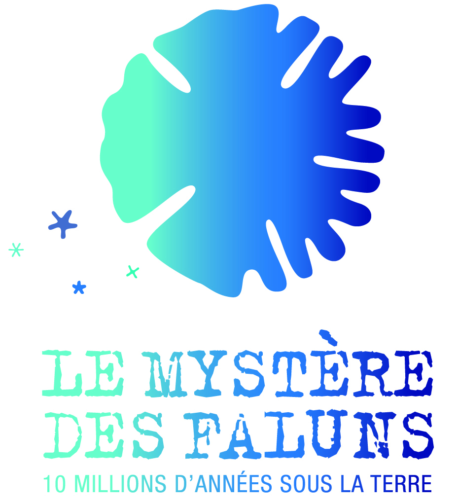 Logo 10 millions d'années des perrières